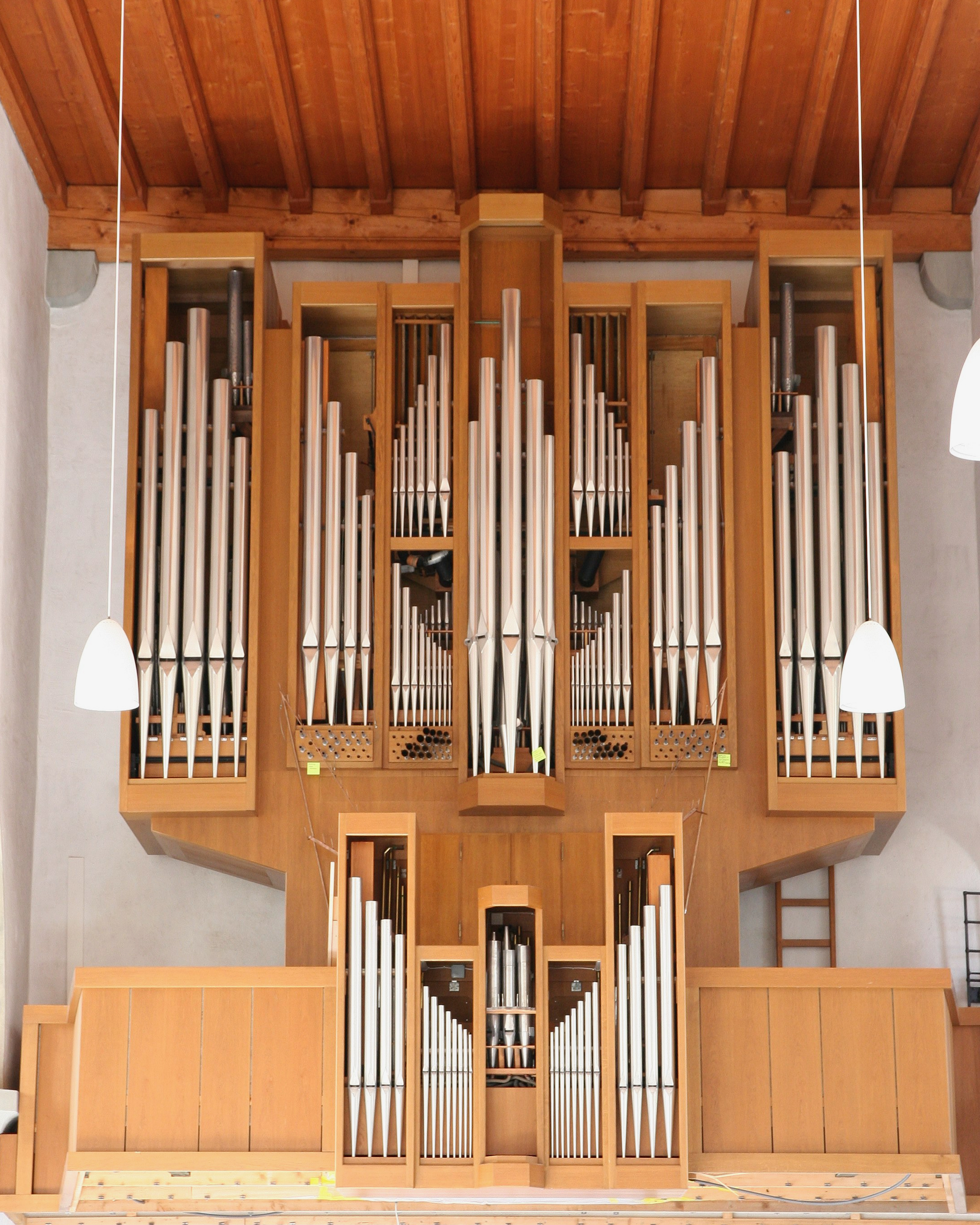 Evangelische Kirche Diessenhofen TG (während Renovierungsarbeiten in der Kirche): Schwenkedel-Orgel von 1972 (31/IV/P)